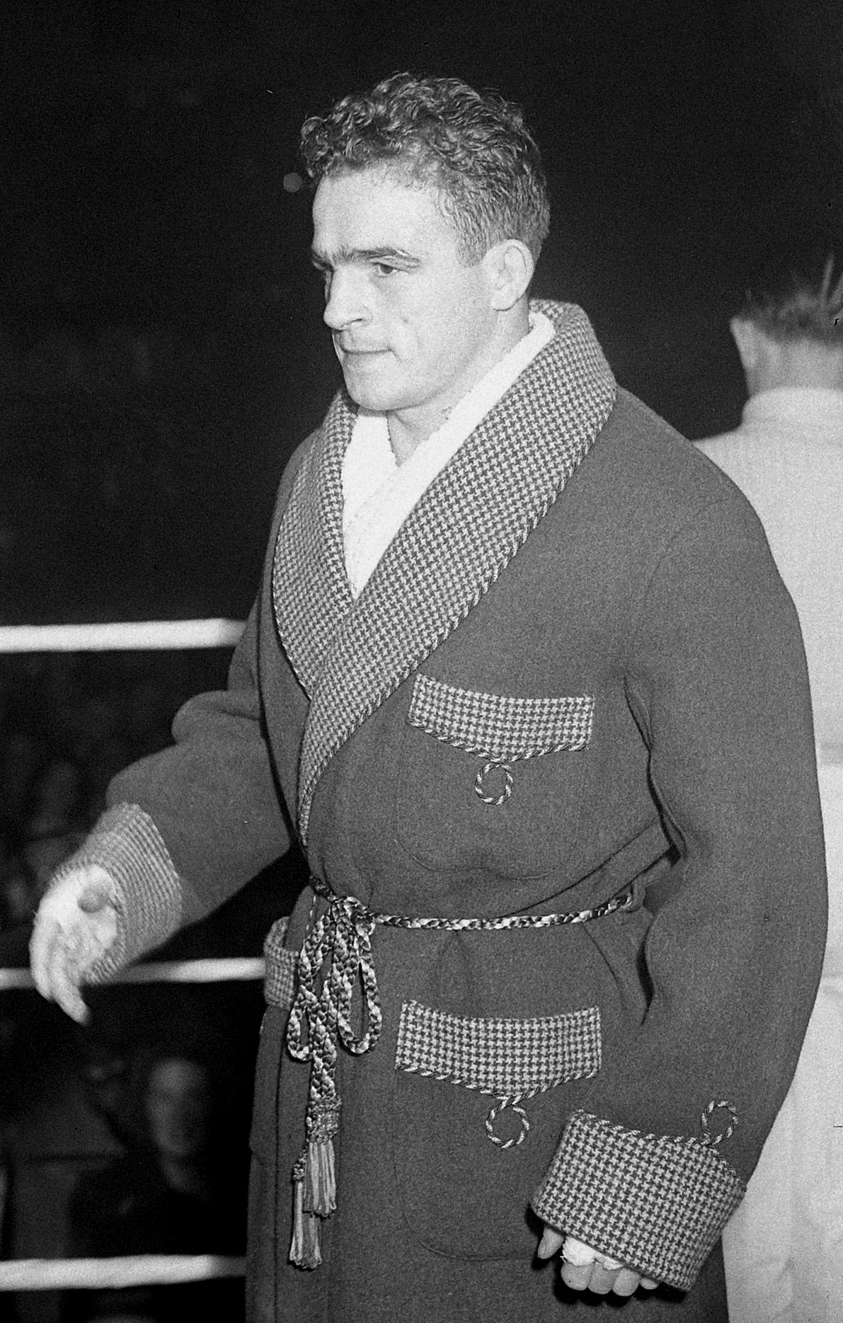 Brussel. Boksen middelgewicht. Cyrille Delannoit (België)